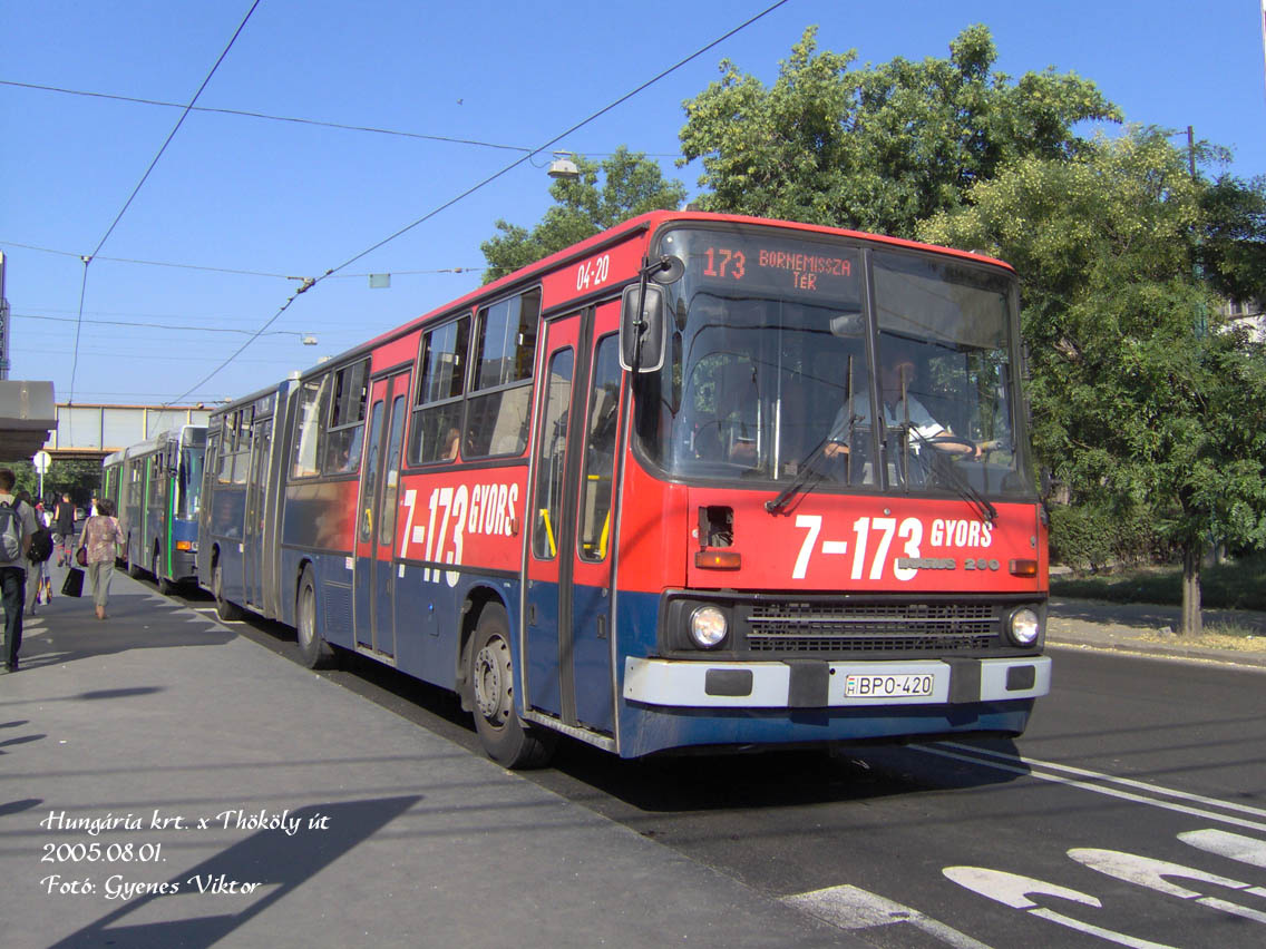 Gyors 173-as jelzésű Ikarus 280-as busz a Hungária körútnál